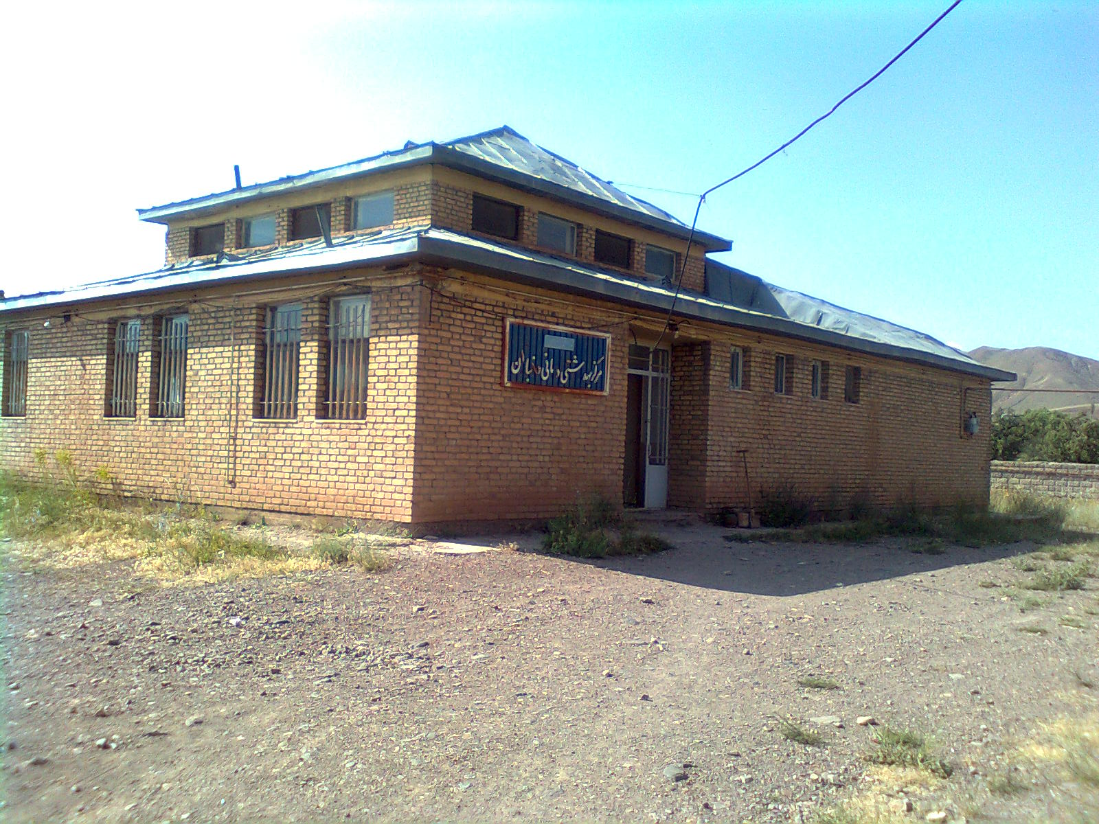 مرکز خدمات بهداشتی و درمانی دانباران با پزشک خانواده و داروخانه کوچک در خدمت اهالی روستای دانباران و روستاهای همجوار آن